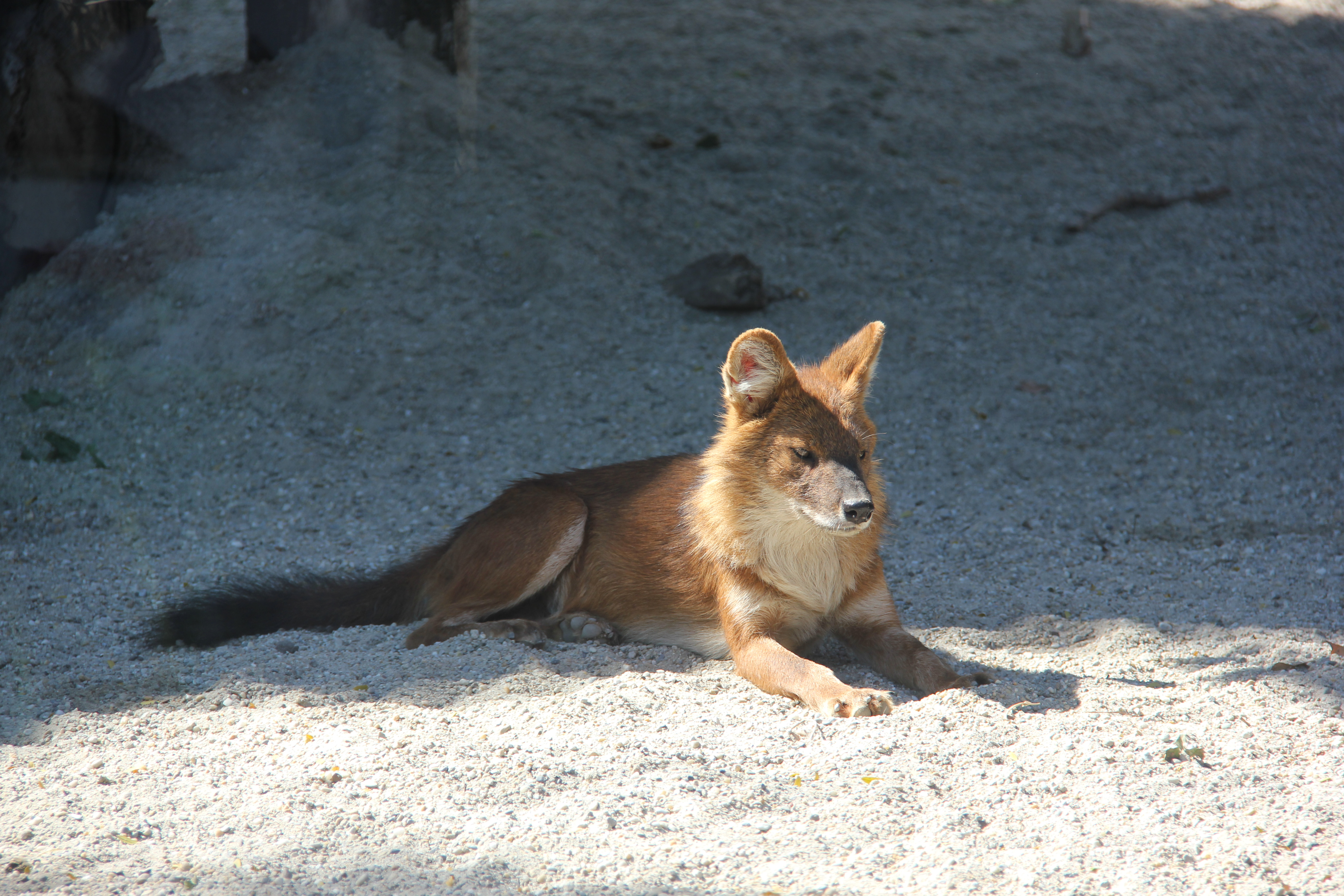 Dhole